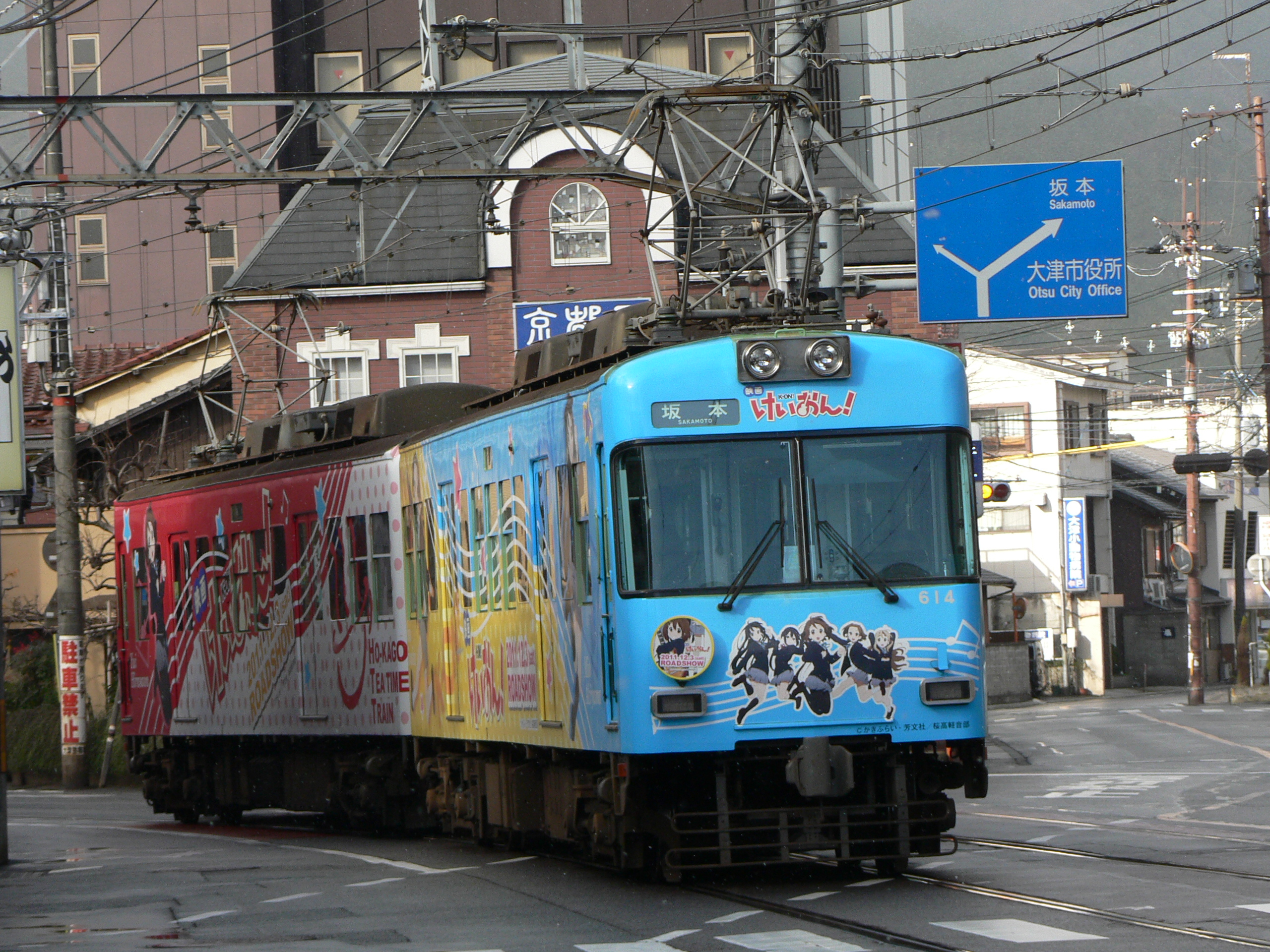 三井寺-浜大津間の併用軌道を走行する京阪600形613編成（映画けいおん!ラッピング編成）。